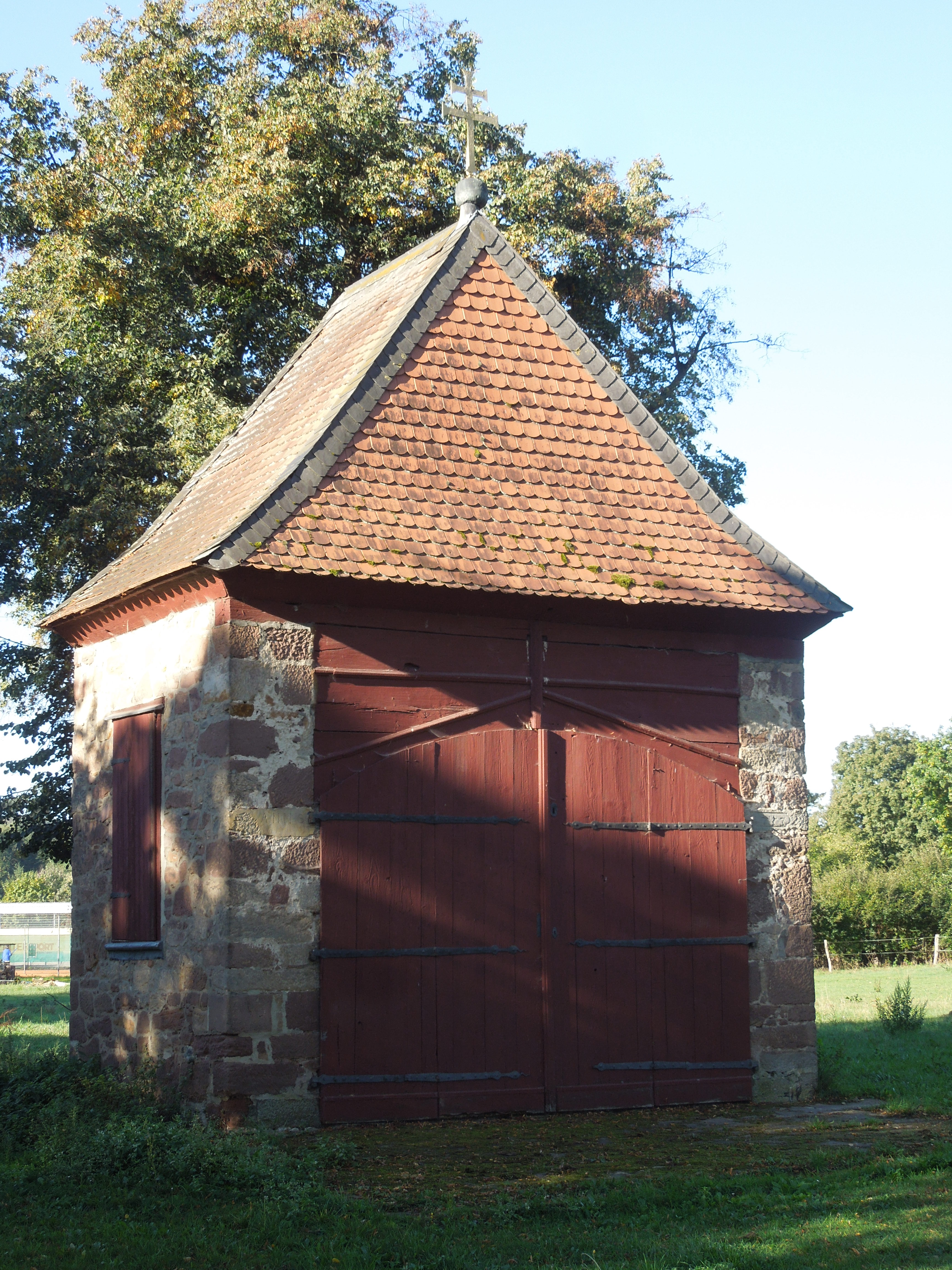 Fritzlar: Kapelle am Siechenrasen